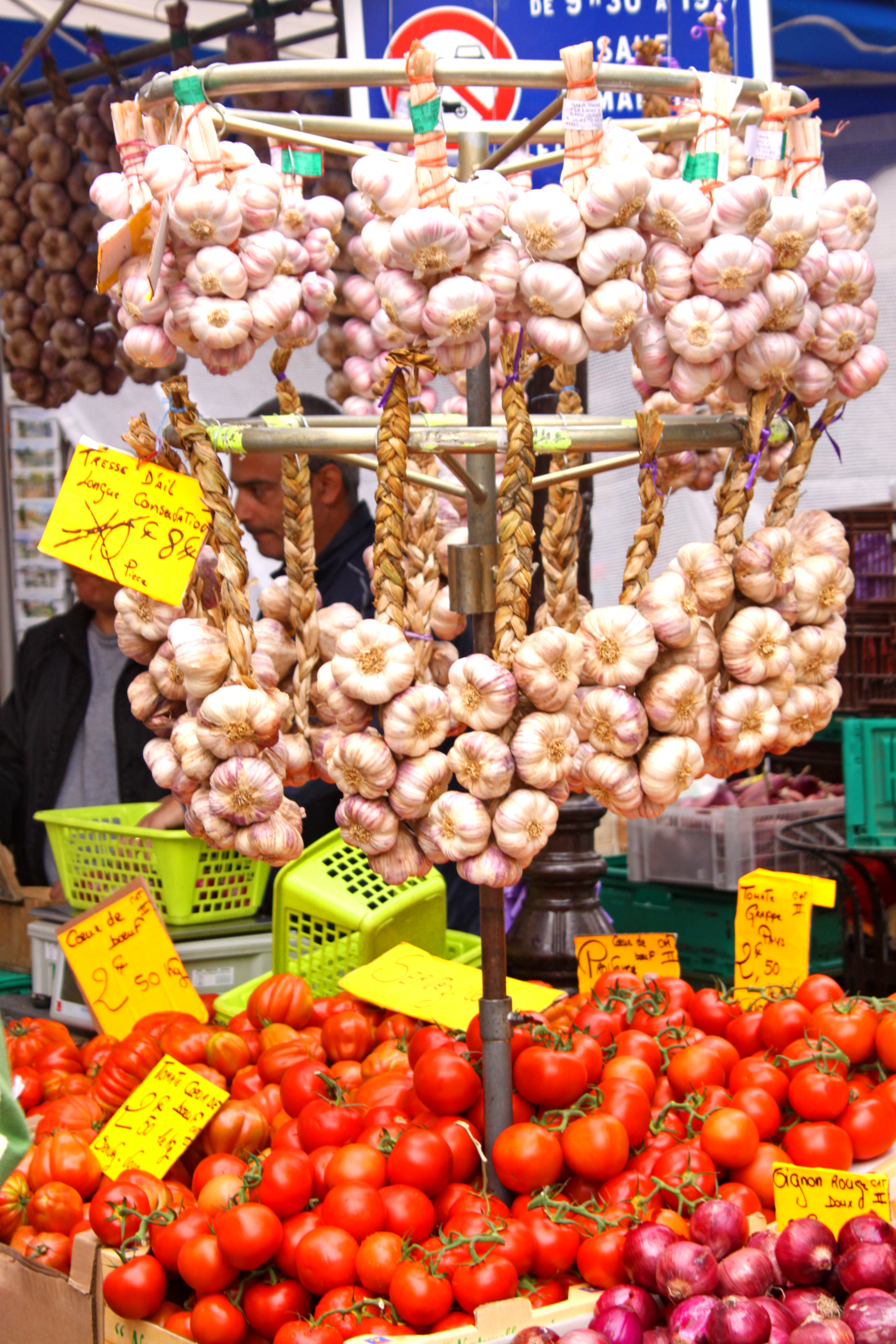 Ail et tomates au marché d'Apt